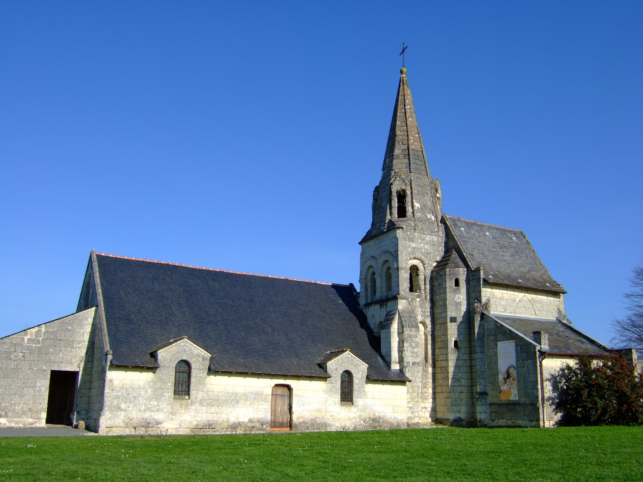 L'église de Parnay (Maine-et-Loire)